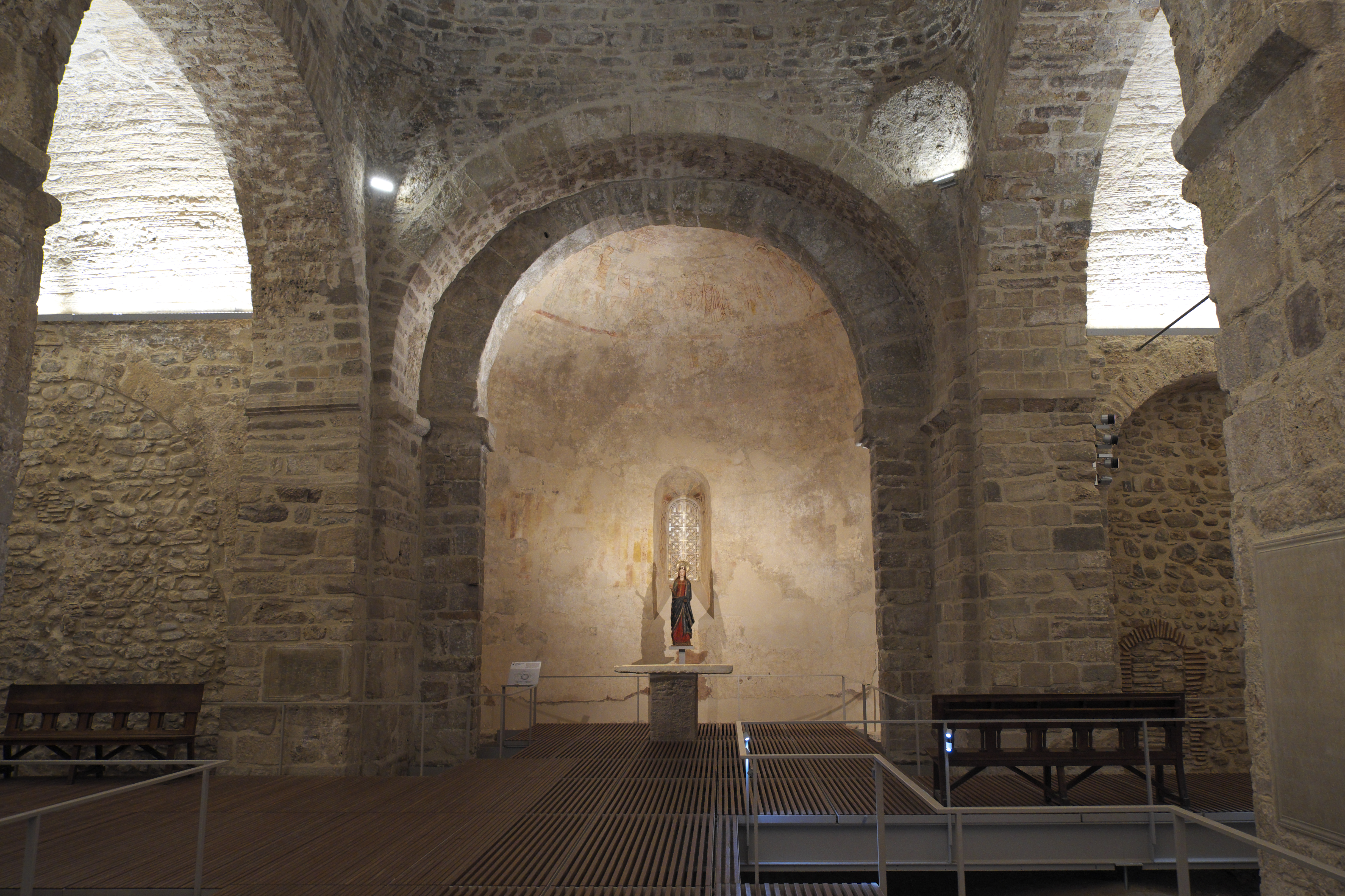 Kirche Santa Maria (Conjunto monumental de Egara) in Terrassa in der Provinz Barcelona (Katalonien/Spanien), Innenraum